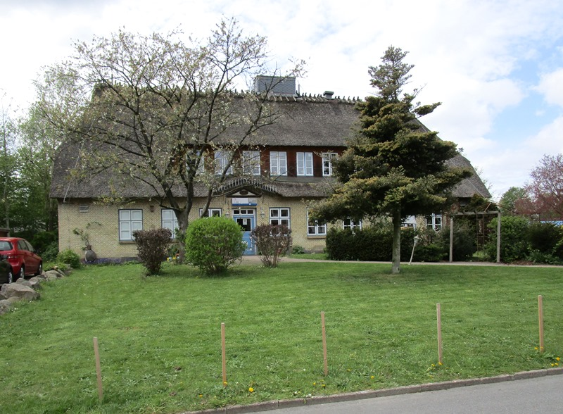 Klinkerhof / Klinkergaard i Slesvig-Sankt Jørgen